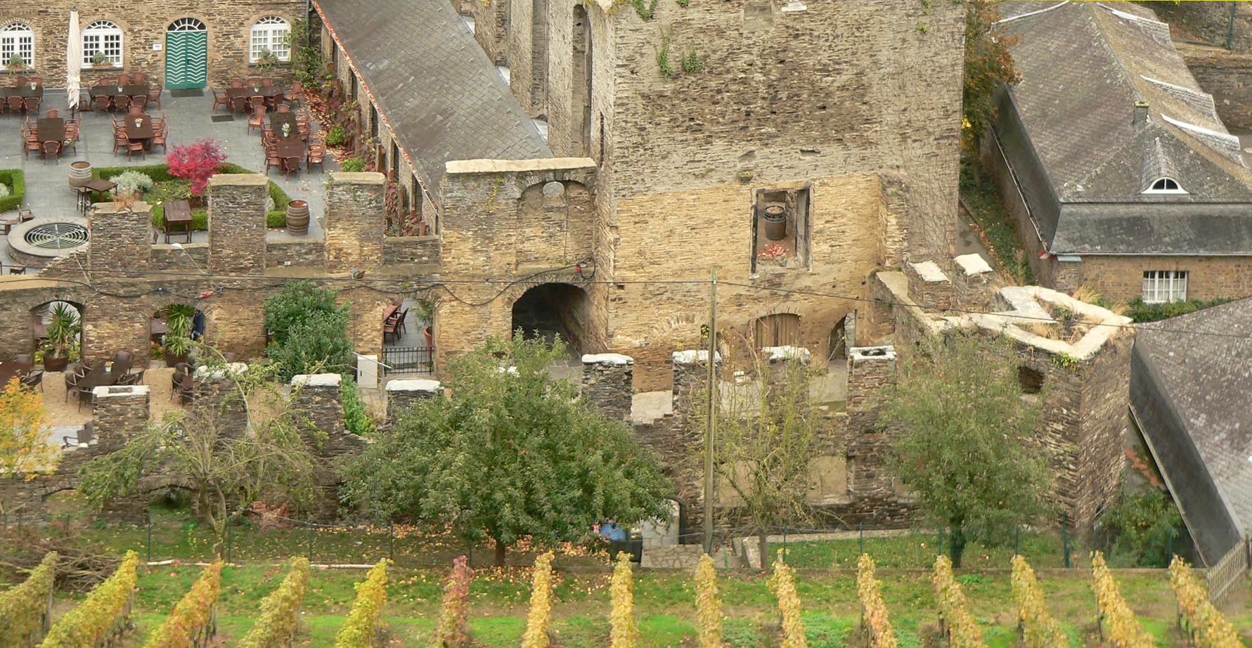 Kloster Marienthal, ruinöser früherer Gebäudeflügel